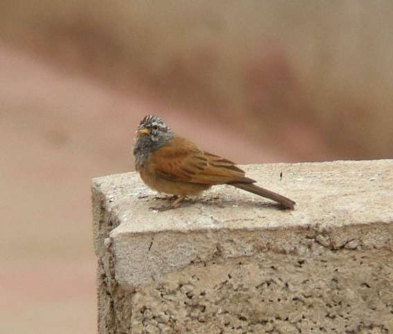 Emberiza sahari (syn. E. striolata race sahari), Taroudant, Morocco, 18 April 2006